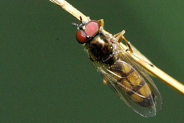 Melanostoma mellinum from Commanster, Belgian High Ardennes .